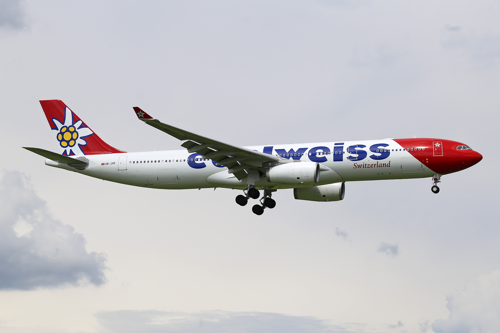 Zürich (- Kloten) (ZRH / LSZH) Switzerland 6.2016